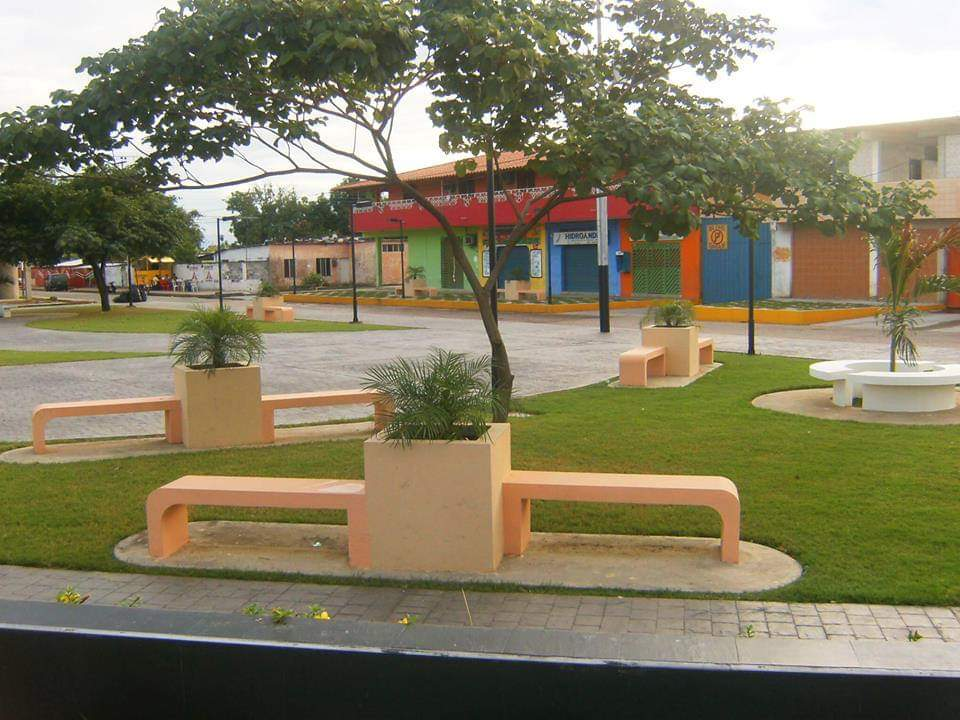 Plaza Hugo C - Antiguo Parque